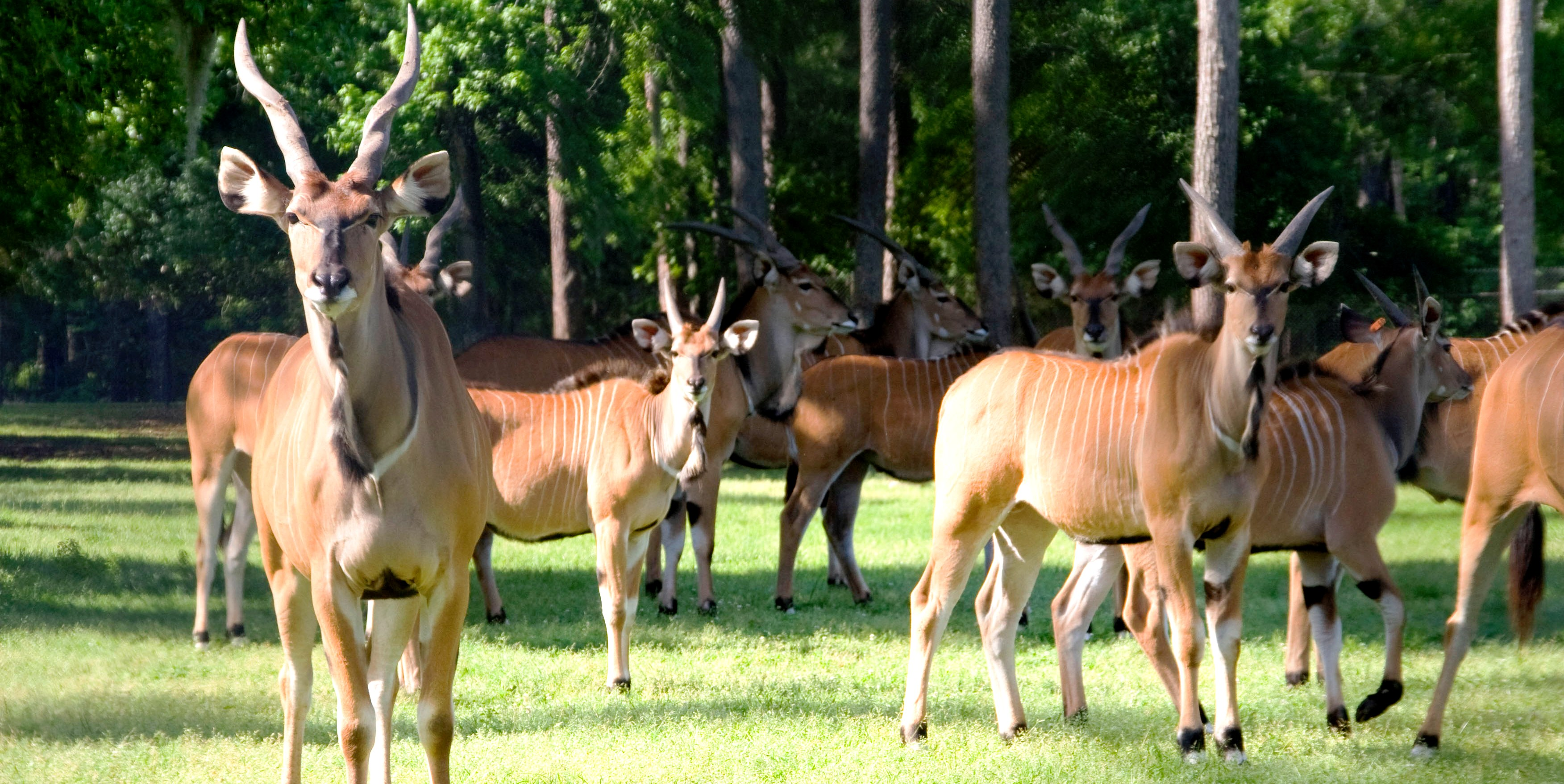 Eastern giant eland (taurotragus derbianus gigas)